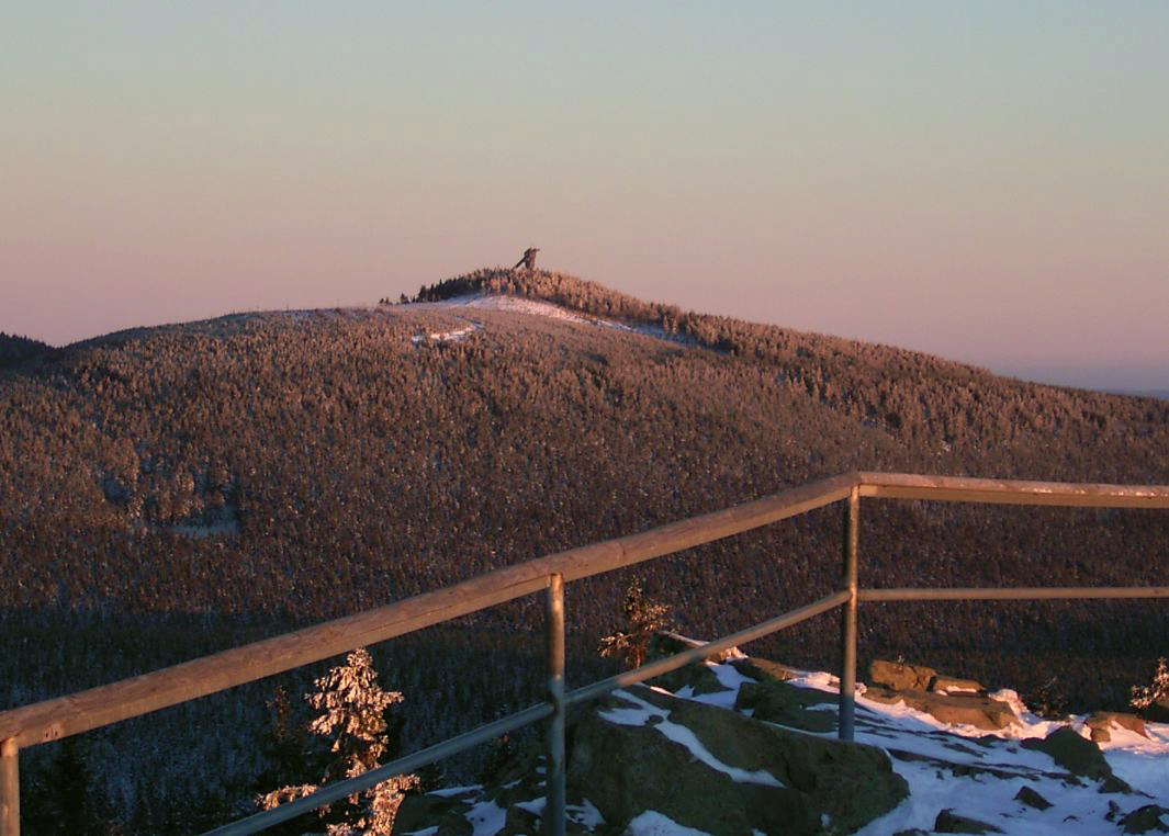 Der Wurmberg von der Kuppel des Achtermanns am 21:12.04 um 16.59 kurz vor Sonnenuntergang photographiert.